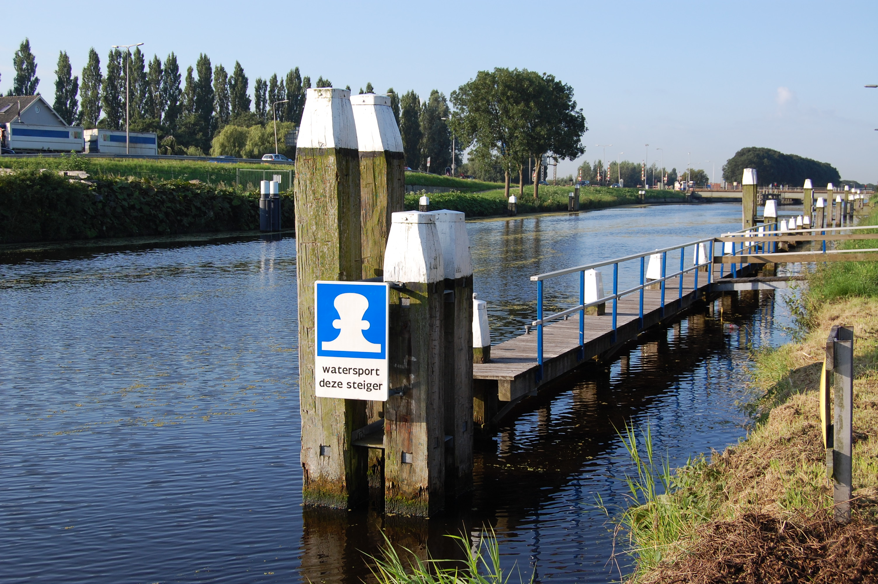 Aanleg/wachtplaats bij Gouwsluis in de Gouwe.